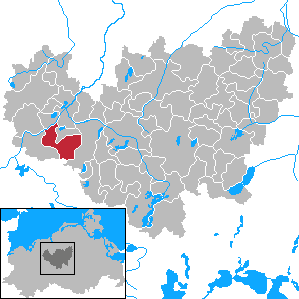 Tarnow in Mecklenburg-Vorpommern - District Güstrow